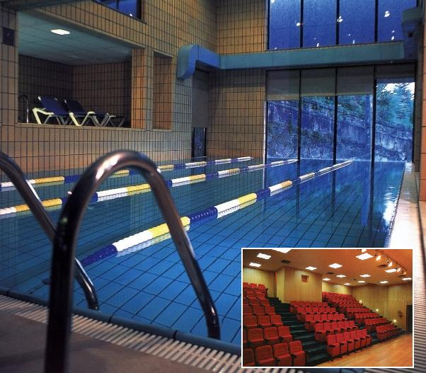 Piscina e auditório do Centro de Animação das Caldas do Gerês, Vila do Gerês - Terras de Bouro